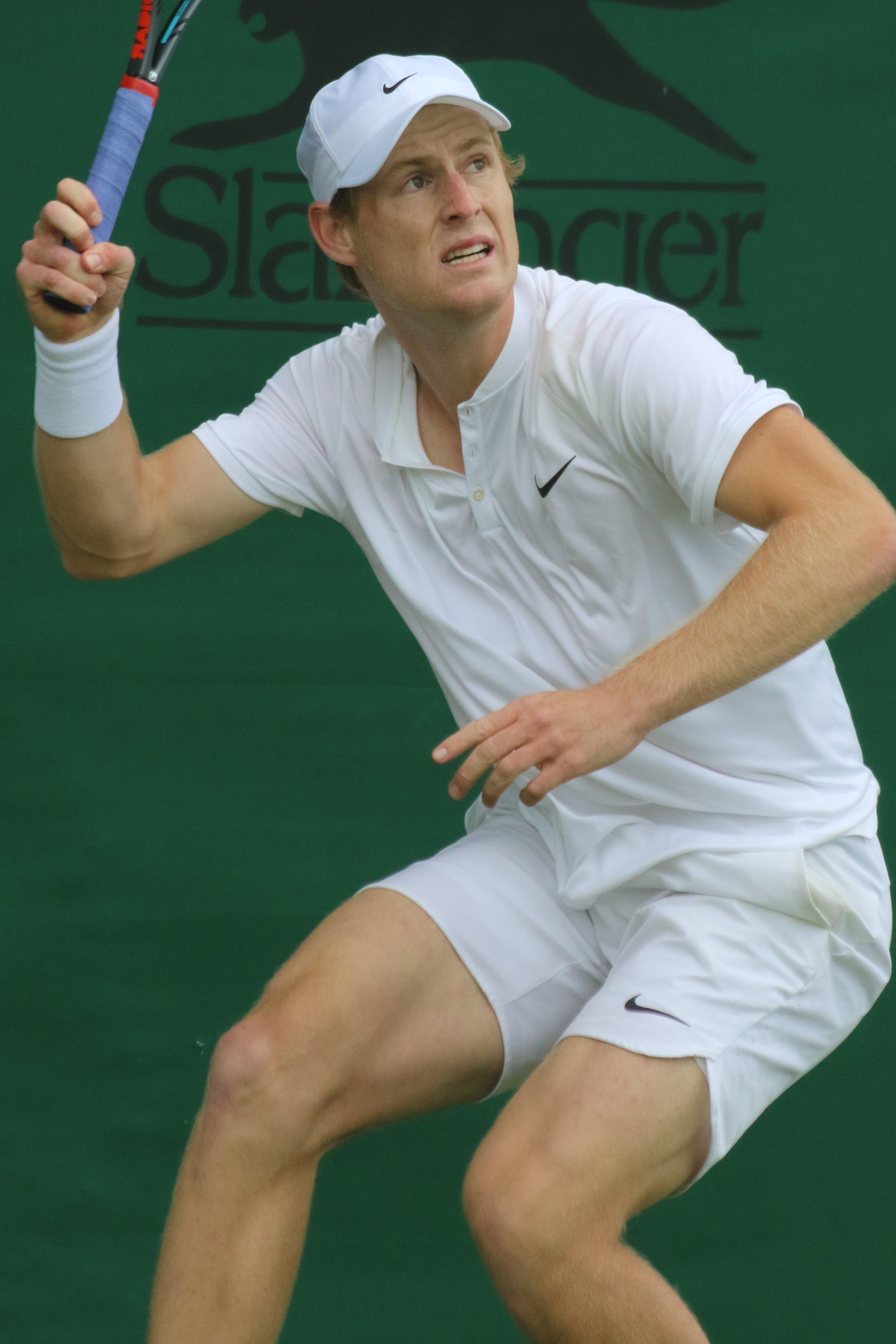 Saville WMQ16 (9)